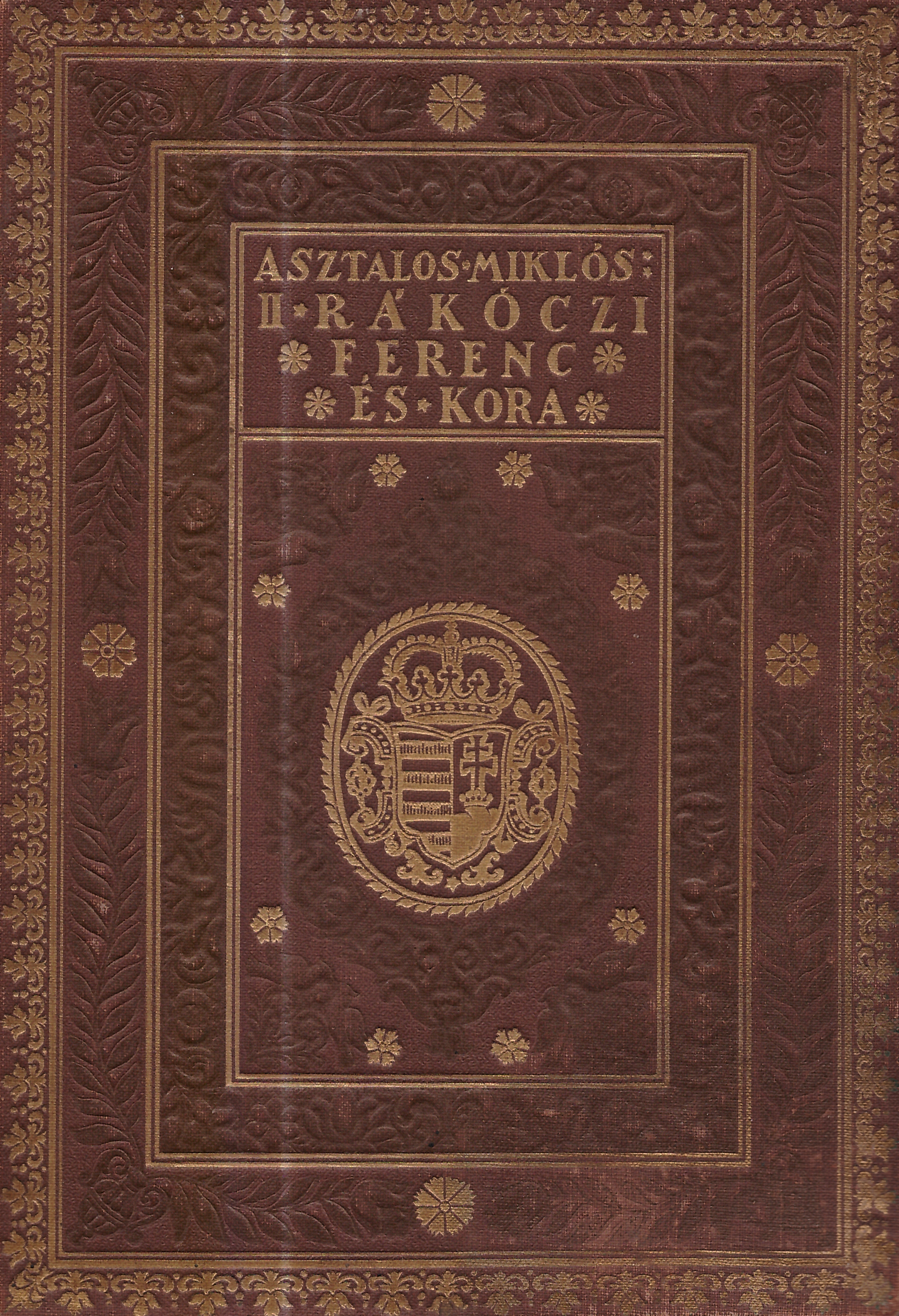 Asztalos Miklós: II. Rákóczi Ferenc és kora (1934, a borító készítője nem ismert)